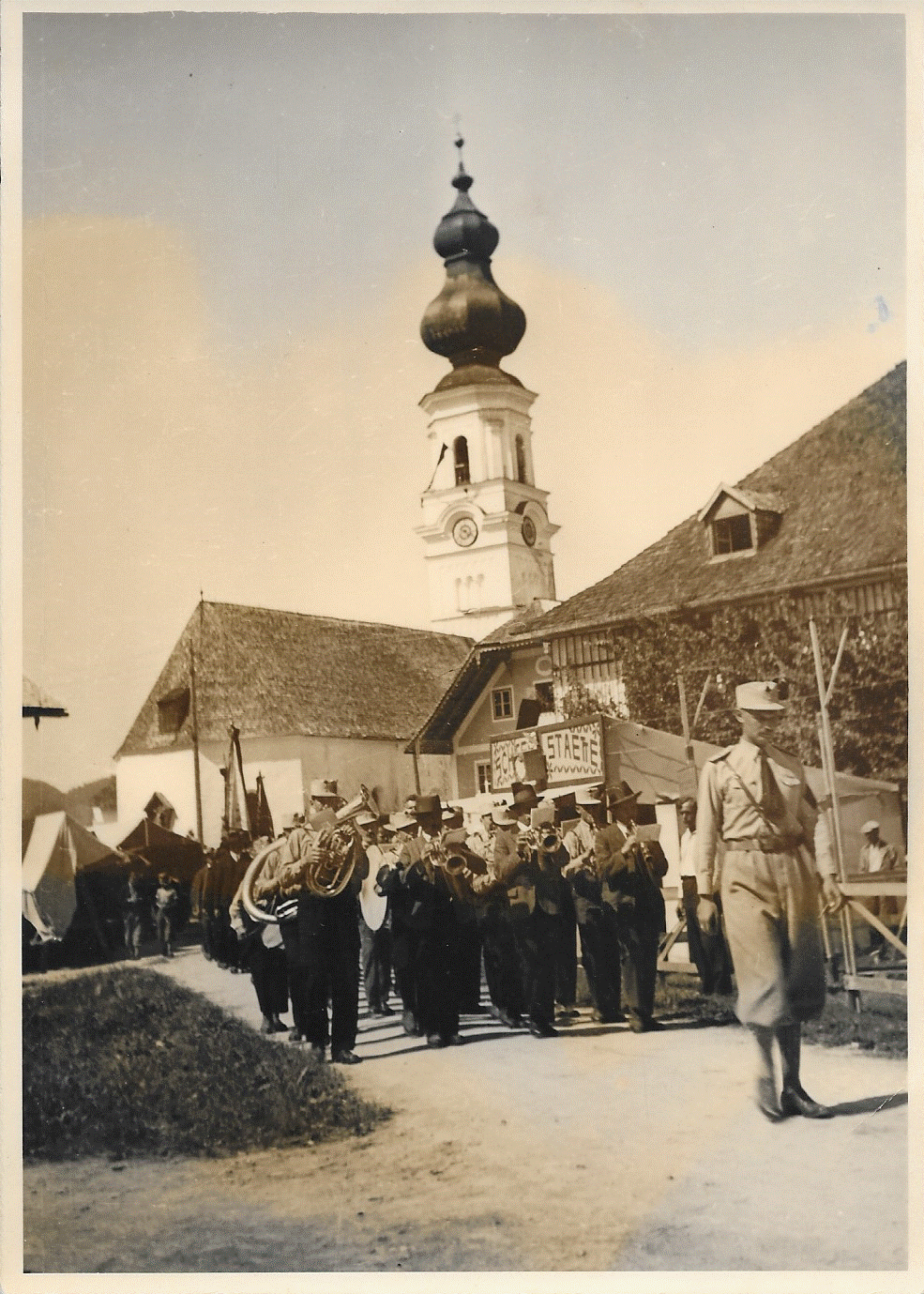 9. Juli 1933 Tag der Reichsbundjugend Faistenau, Auer Musik mit OSS-Ortsleiter Rupert Mayr